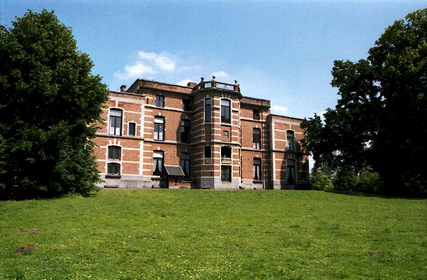 Kasteel te Opdorp. Beschermd monument